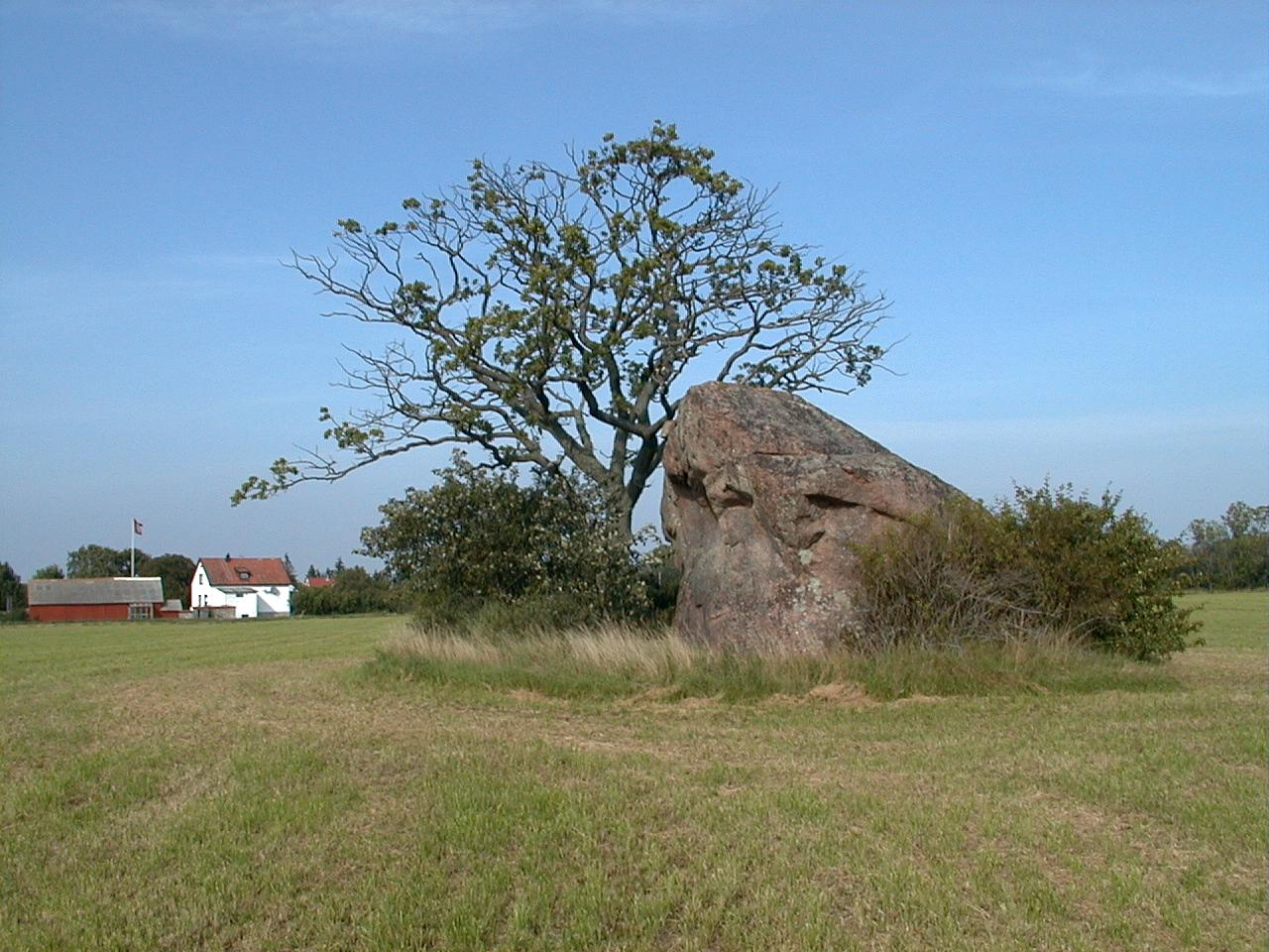 Den s.k. Bastustainen vid Hägdarve i Rone (5J 9 c) är det största flyttblocket (jätteblocket) som påträffats på Gotland. Blocket består av Rapakivigranit med ett sannolikt ursprung i den åländska skärgården. The largest erratic boulder on Gotland, a boulder of rapakivi granite, derives from the archipelago of Åland. Rone parish (5J 9 c). Fotograf: Esko Daniel, SGU